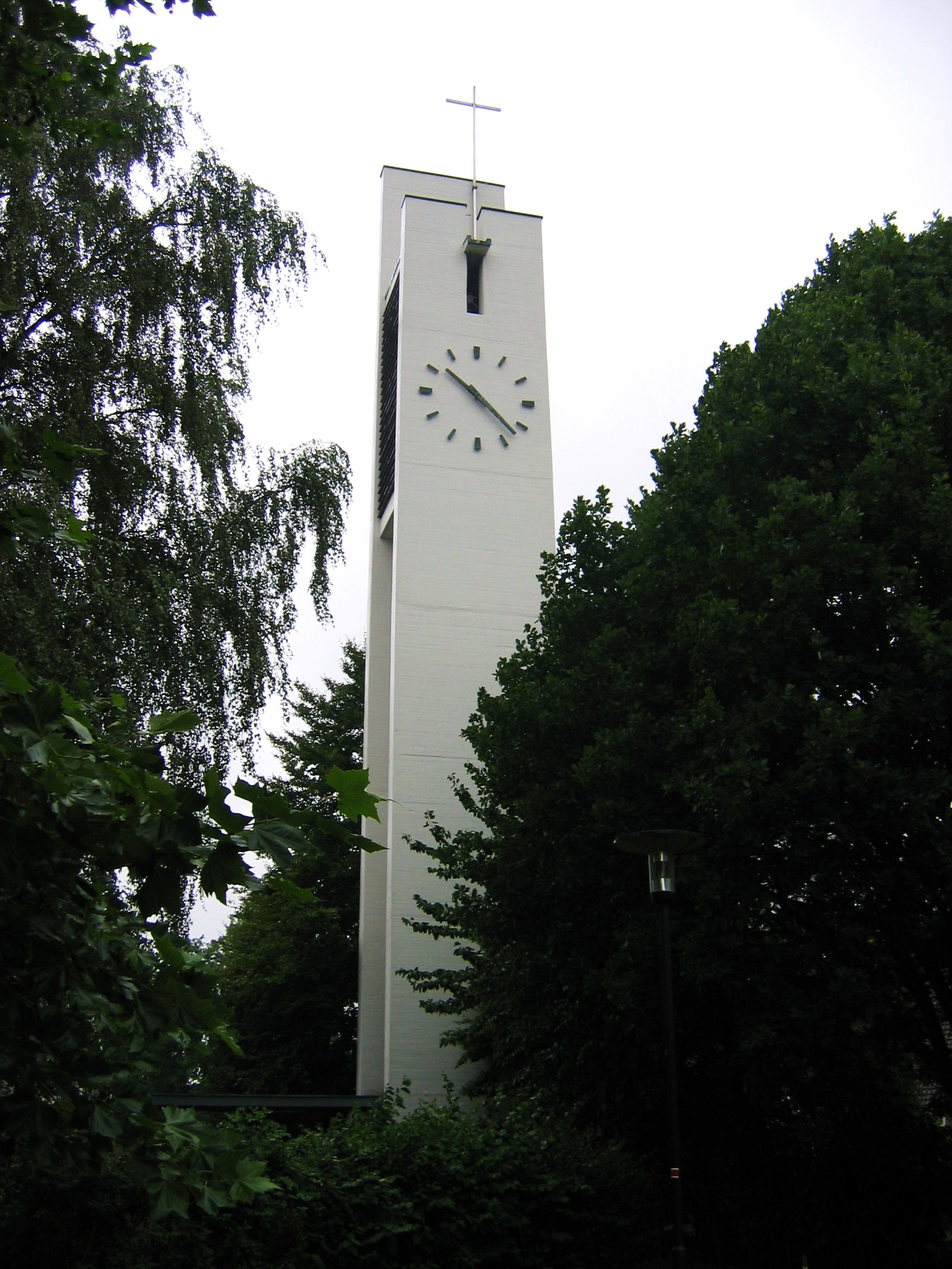 Ev.-luth. und ev.-ref. Christuskirche in Bad Salzuflen-Lockhausen